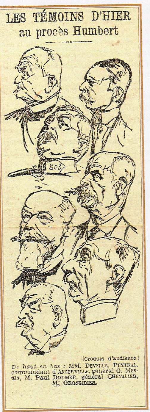 croquis d'audience du Procès Humbert